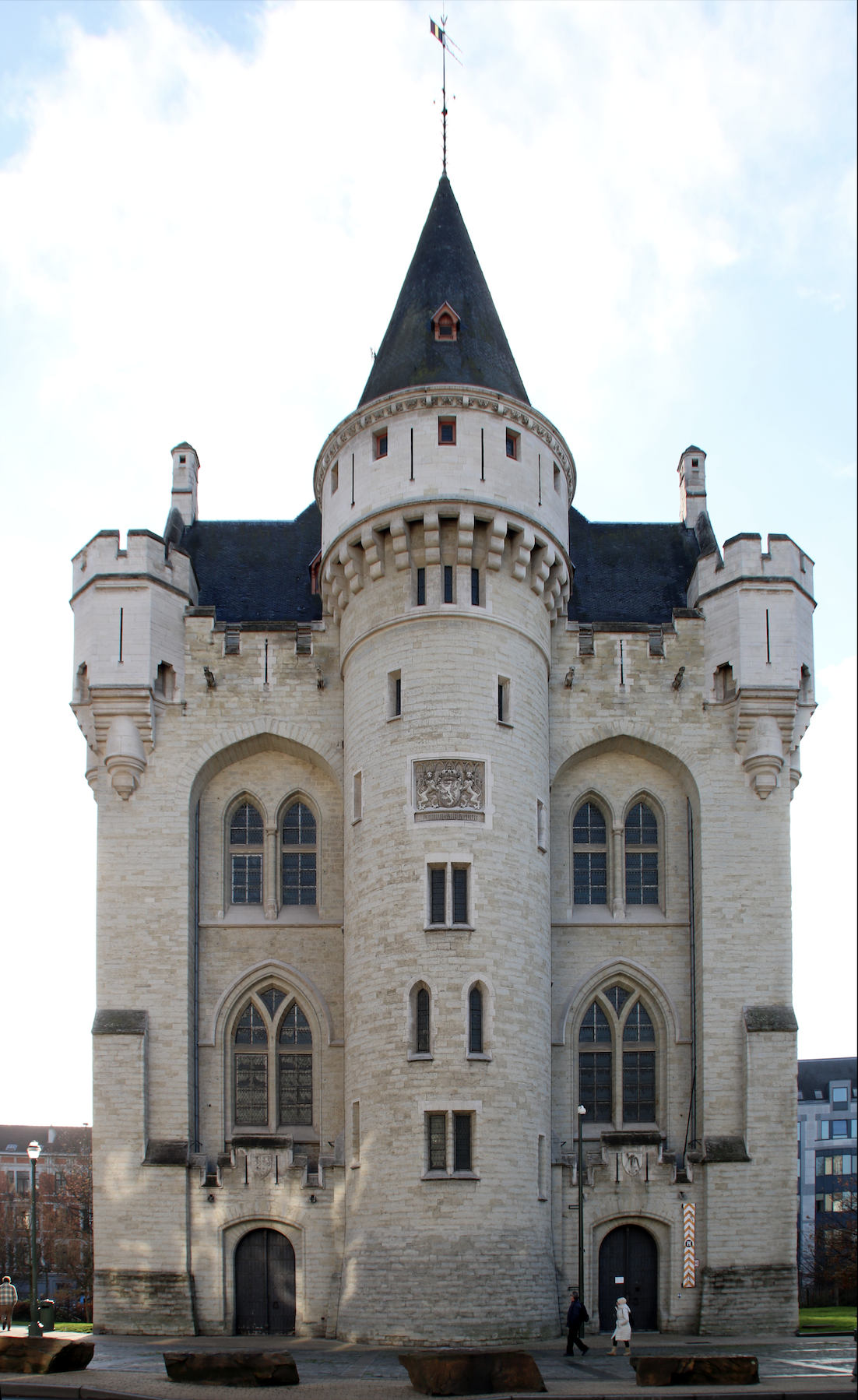 Porte de Hal